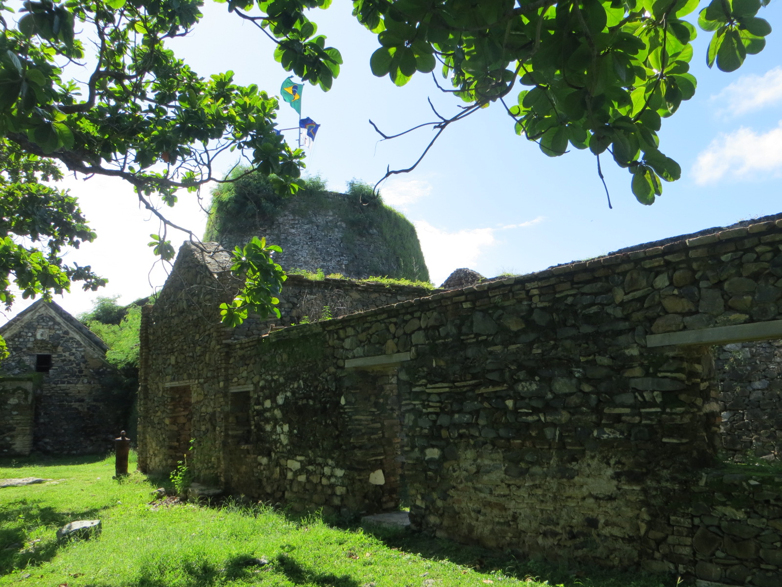 Forte de Nossa Senhora dos Remédios de Fernando de Noronha - Pernambuco, Brasil